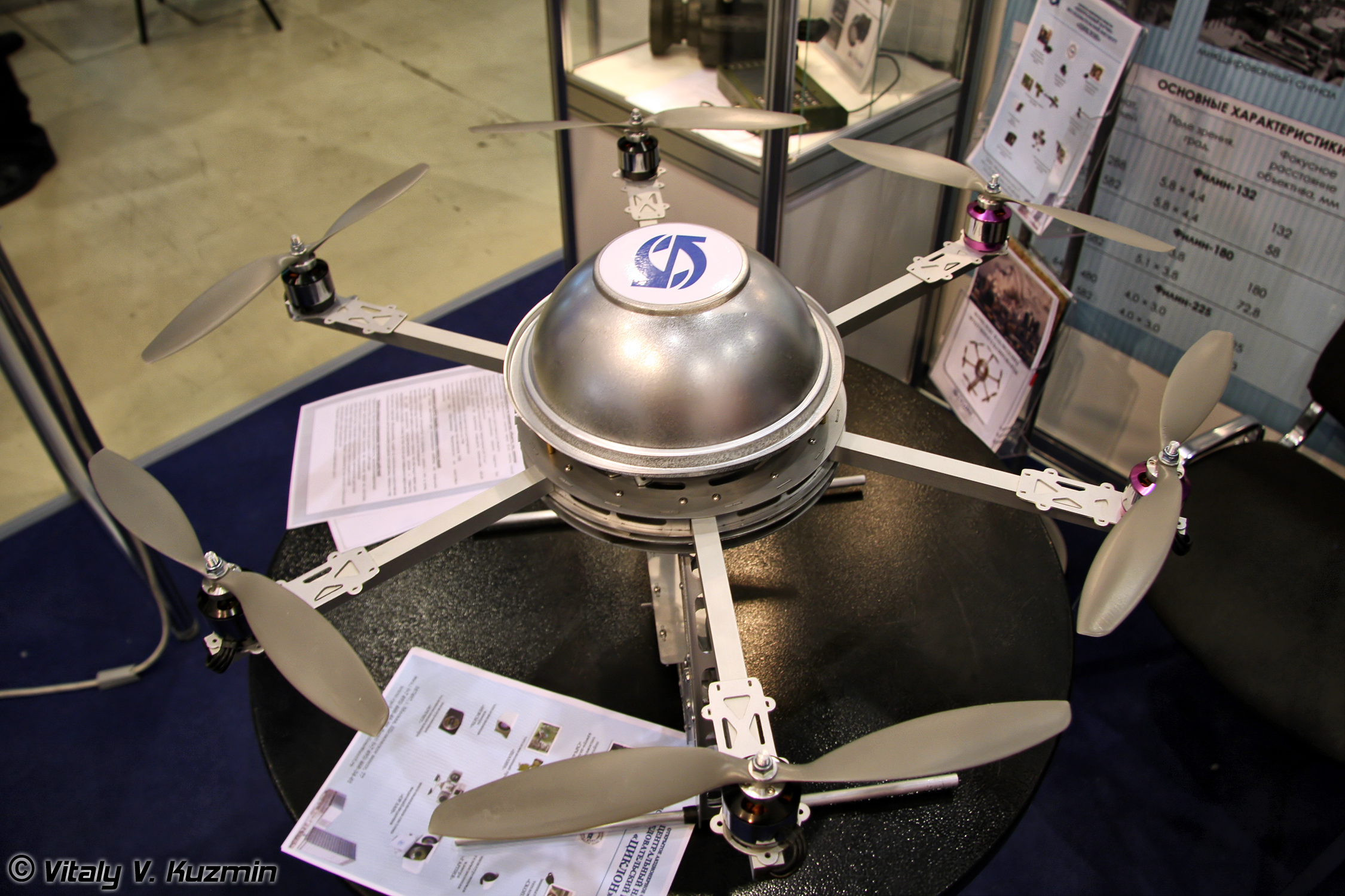 БПЛА от ЦНИИ Циклон, пока без названия. (Unnamed UAV from Cyclone company)